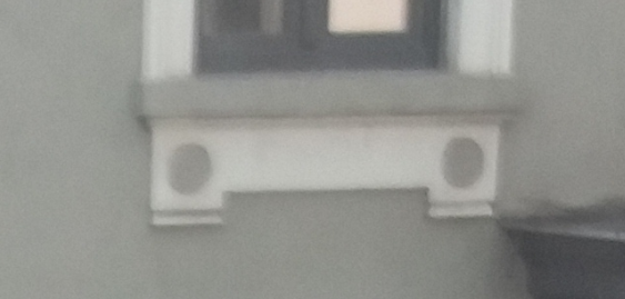 Neutenpaneel onder de vensterbank van een neoclassicistische woning in Gent, België.